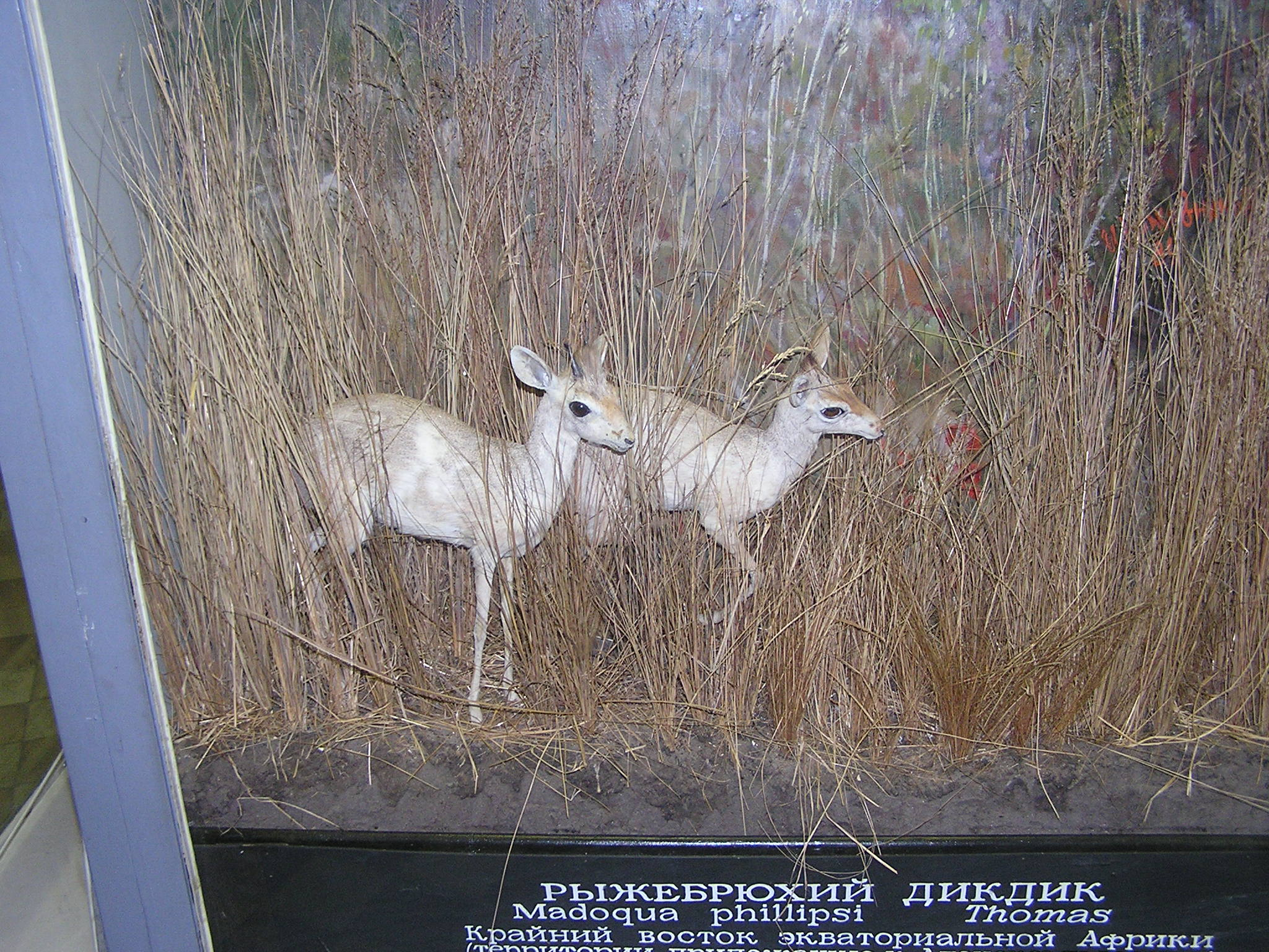 Зоологический музей в Санкт-Петербурге. Рыжебрюхий дикдик Identification: We can see Madoqua phillipsi on the pedestal = Madoqua saltiana phillipsi